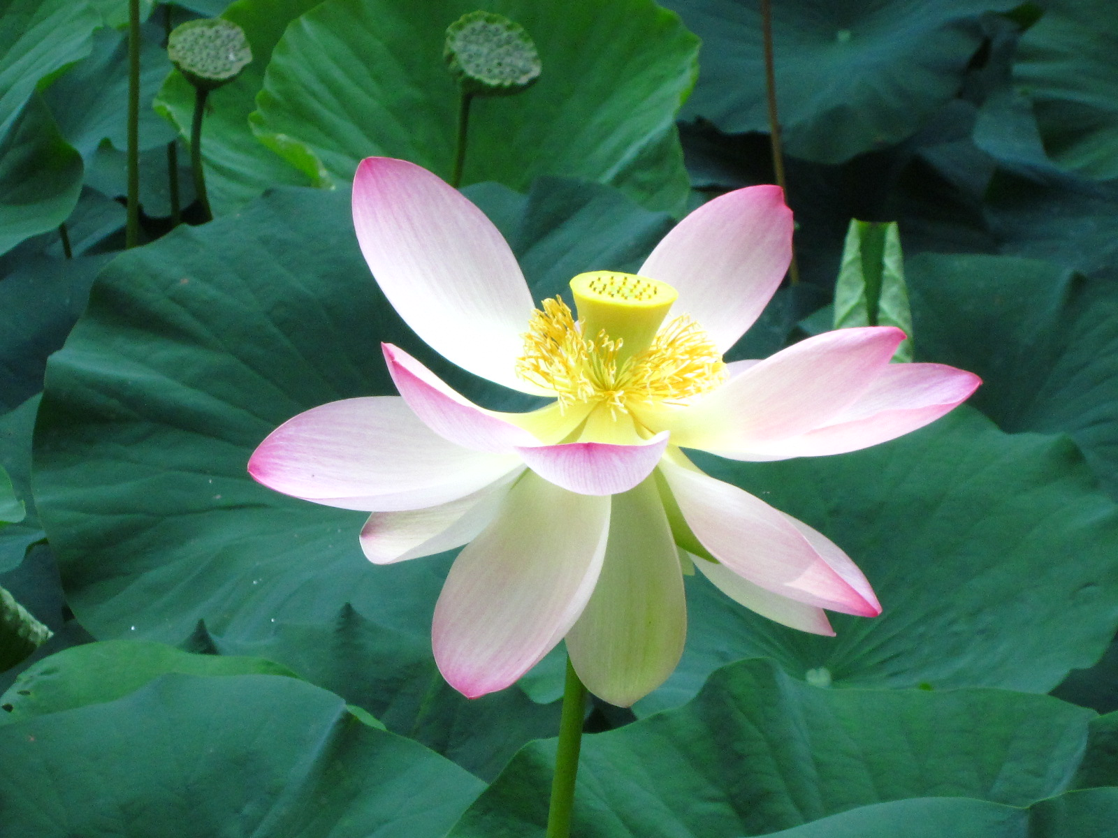 Indijski lotos, Park Šmarješke Toplice